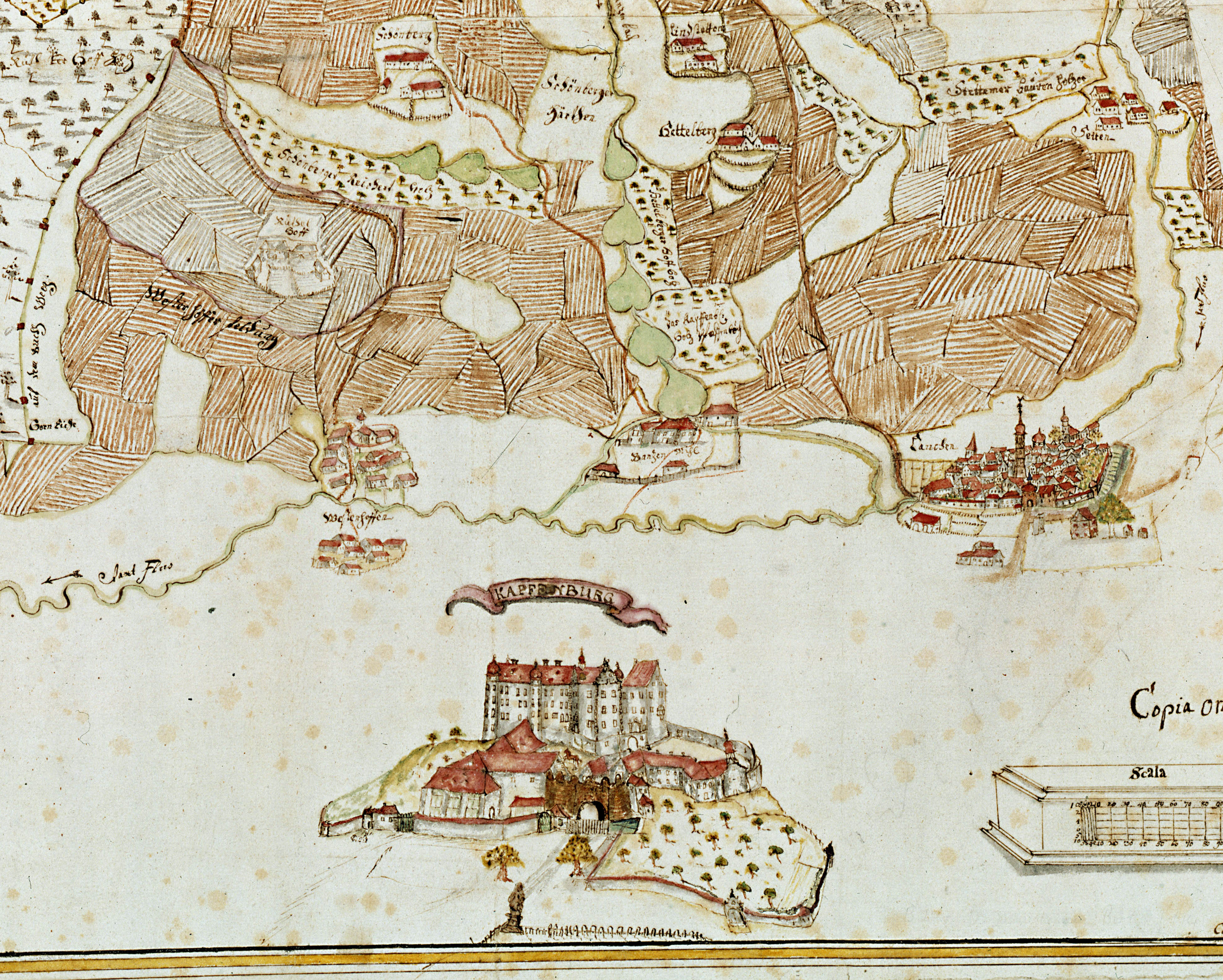 Die Kapfenburg, 1740 (StAL JL 560 Nr. 1)